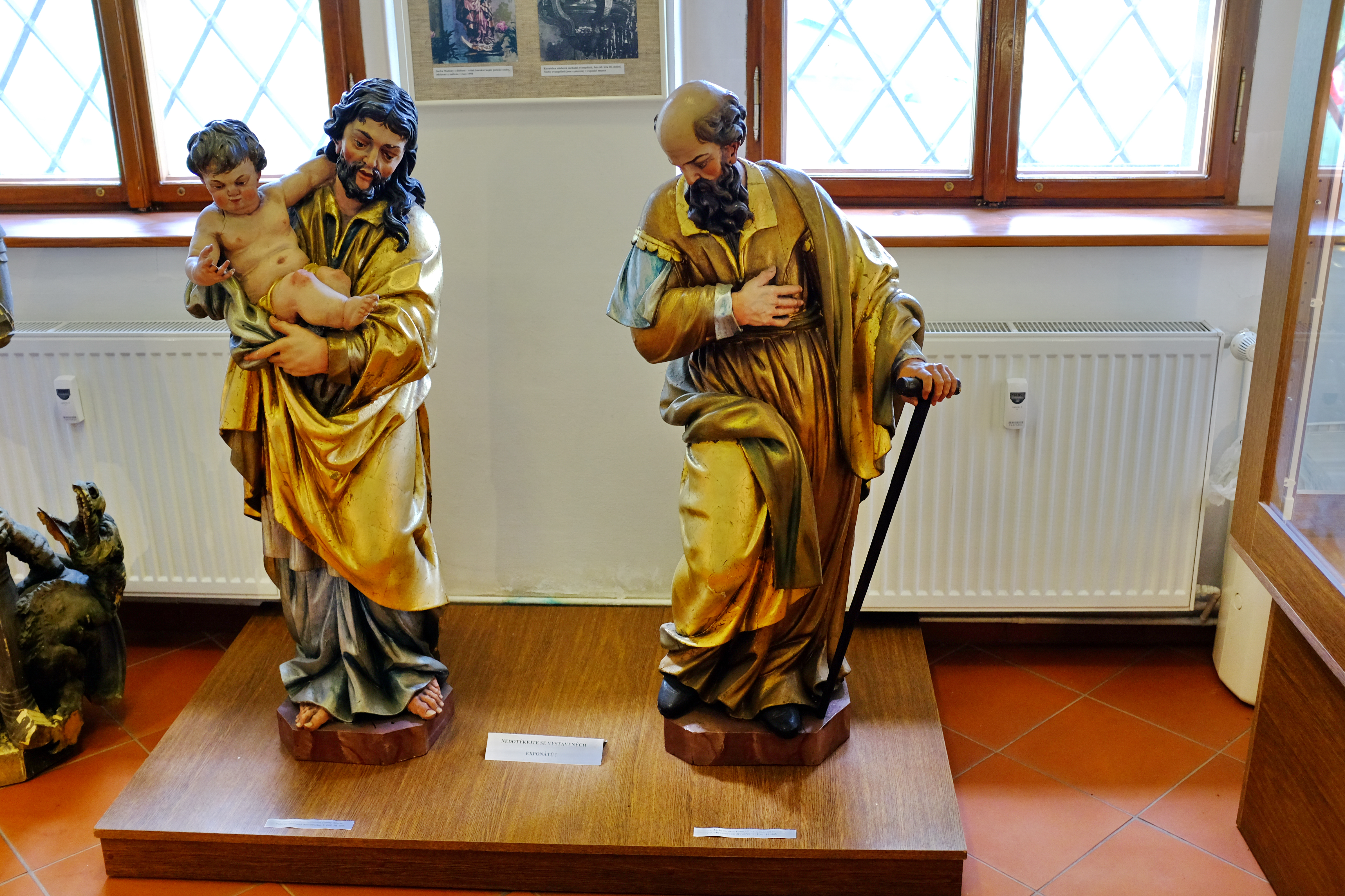 Muzeum v Horním Slavkově, vnitřní expozice, sochy sv. Josefa (evangelní strana) a sv. Jáchyma (epištolní strana) přemístěné z kostela svaté Anny